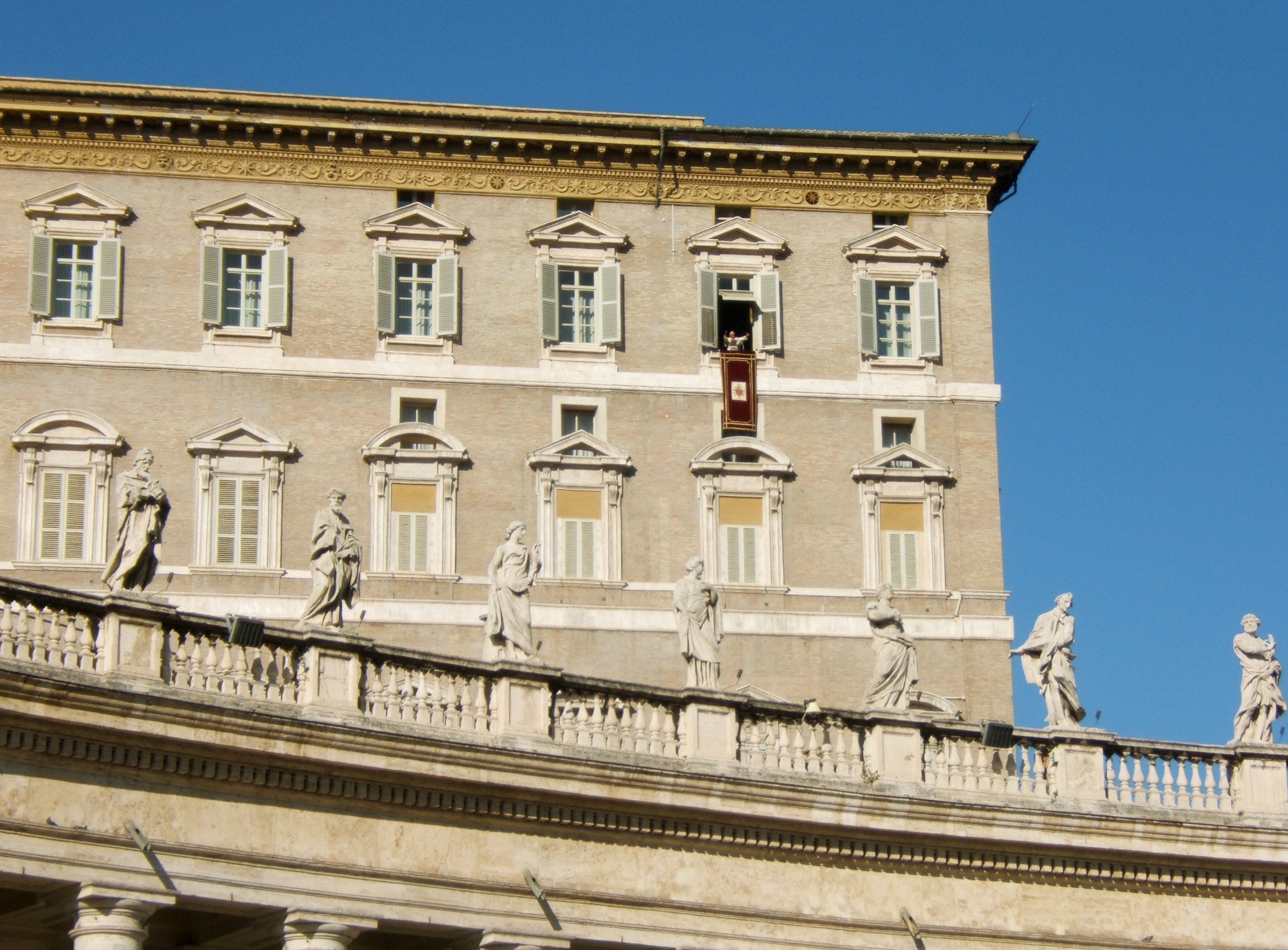 Allocution du Pape Benoît XVI au Vatican.